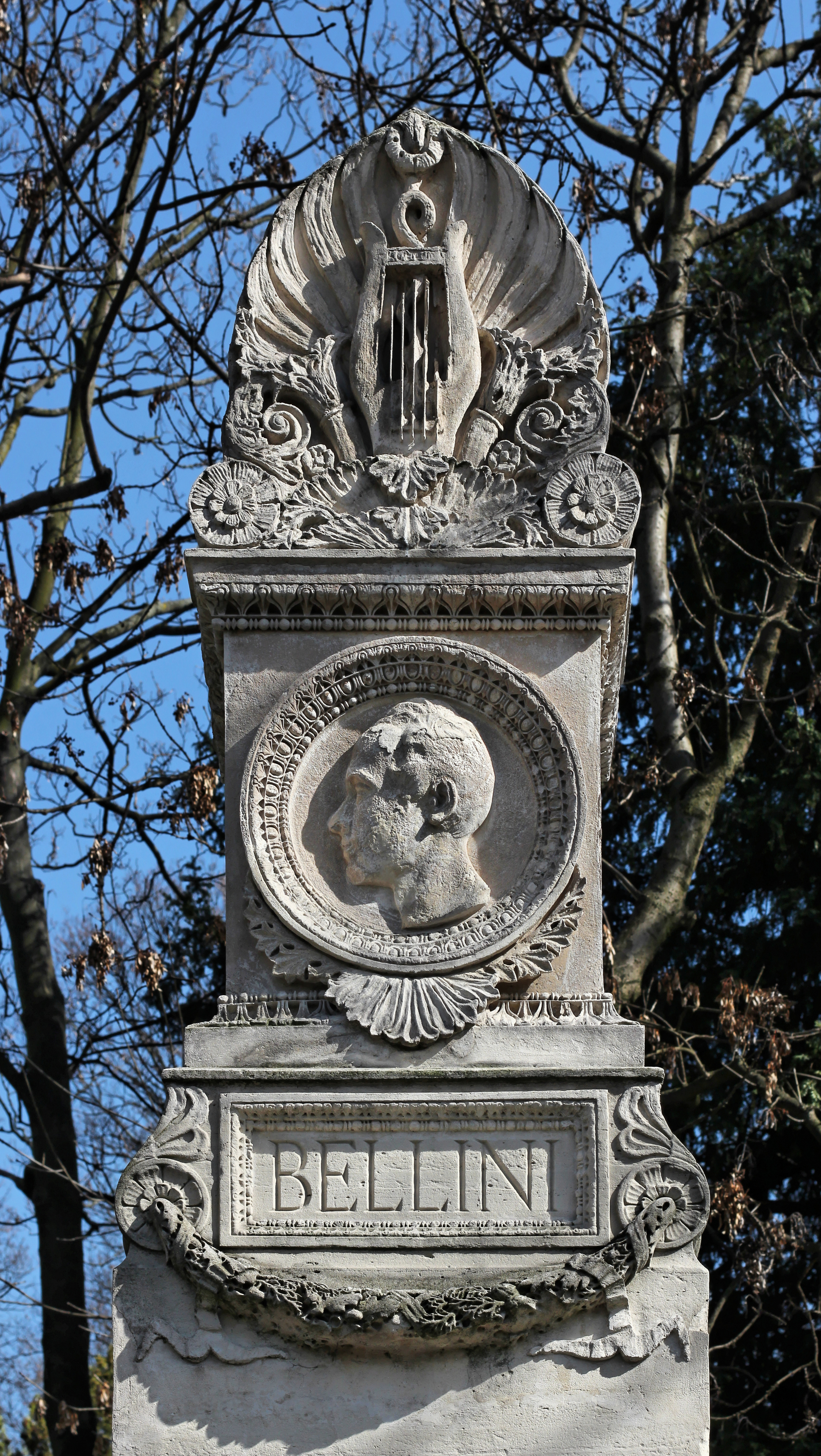 Cénotaphe du compositeur italien Vincenzo Bellini (1801-1835), avec portrait en médaillon. À l'origine, le monument comportait une statue de femme ailée.